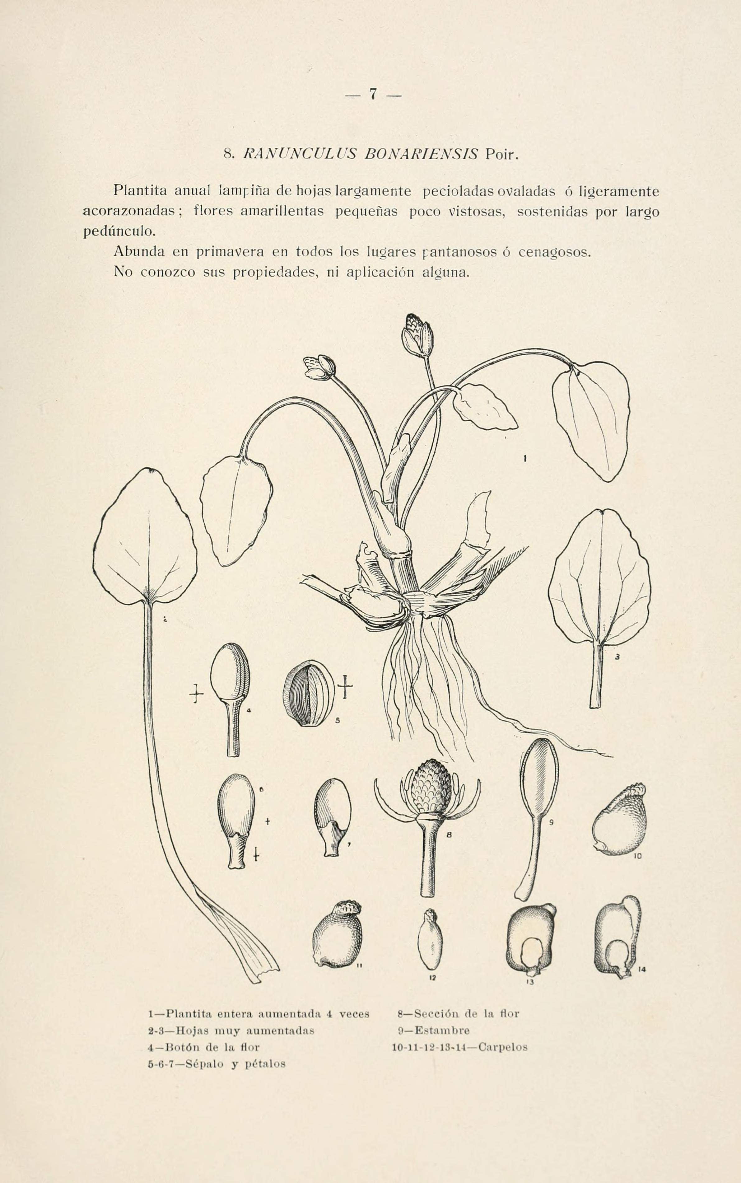 Flora de la Provincia de Buenos Aires.